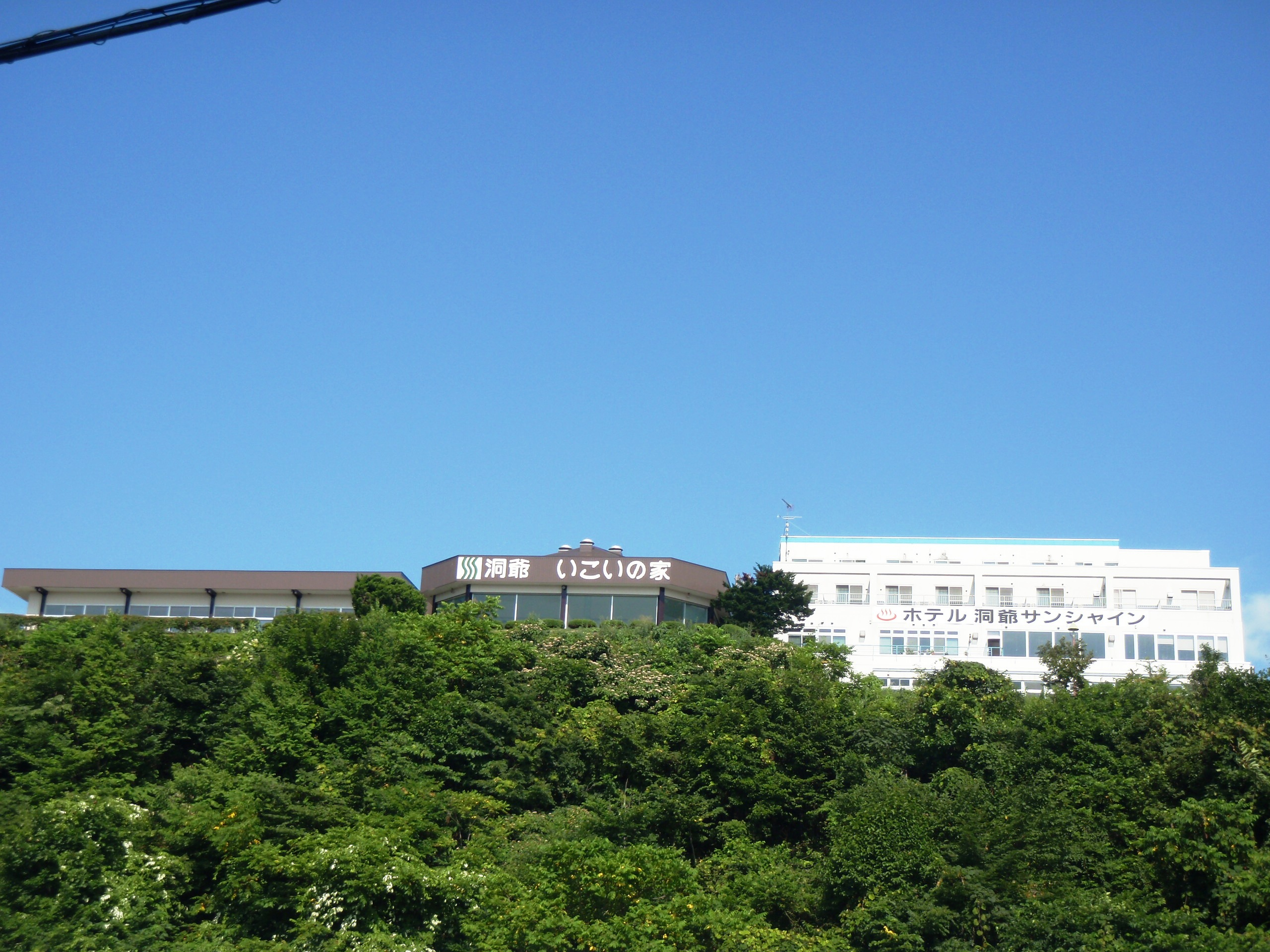 洞爺湖畔から見上げる洞爺温泉。左：洞爺いこいの家、右：ホテル洞爺サンシャイン